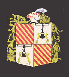 Dit is het familiewapen van de familie Loyola. Het familiewapen is verdeeld in twee secties. Het eerste gedeelte bestaat uit een “olla” of ketel, die aan een pothaken hangt, en twee grijze "lobos"of wolven die de ketel en de pothaken vasthouden. De woorden "lobo" en "olla"werden verbonden tot "lobo y olla"wat uiteindelijk verbasterde naar de naam Loyola. De wolf was een teken van “ricos homines” of nobelheid. Alles bij elkaar moest het generositeit van de familie Loyola weergeven. Het tweede gedeelte is de divisie van het huis van Onaz, familie van vaderszijde. Hier ziet men zeven roden banen op een gouden ondergrond. Dit was een teken van grote eer, aangezien koning Alfonso de familie Onaz in 1332 de permissie gaf om deze zeven banden te dragen/gebruiken op hun familie wapen. Ze verdiende deze eer door de getoonde moed van zeven helden uit de familie die zichzelf bewezen in de Slag van Beotibar in 1321. Bij deze slag versloegen de Spaanjaarden 70.000 Franse, Navarezen en Gascons.